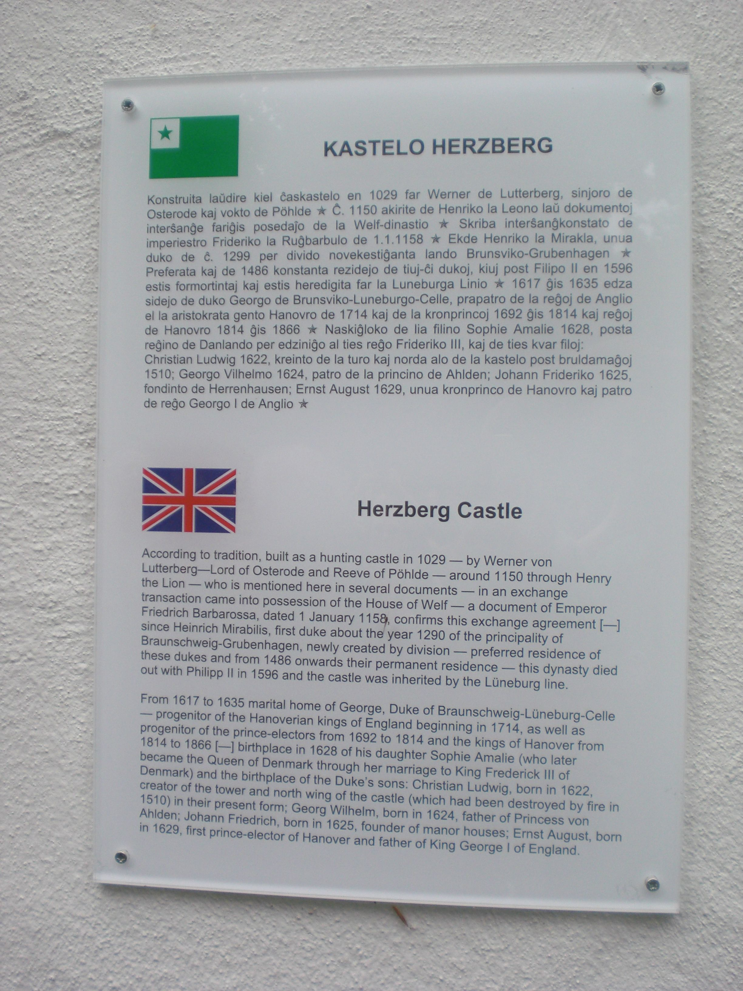 Dulingva klarigo en Hercbergo